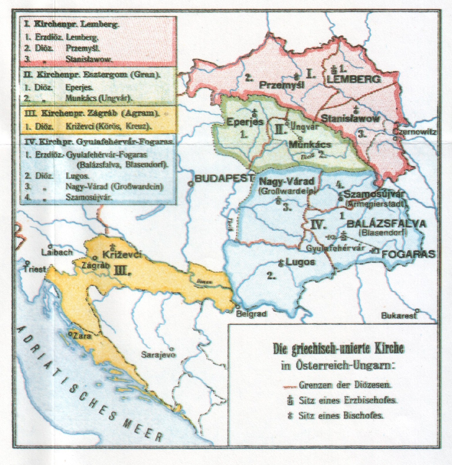 Karte der mit Rom unierten (griechisch-katholischen) Bistümer in Österreich-Ungarn. Aus: Cölestin Wolfsgruber, Kirchengeschichte Österreich-Ungarns, Wien 1909.